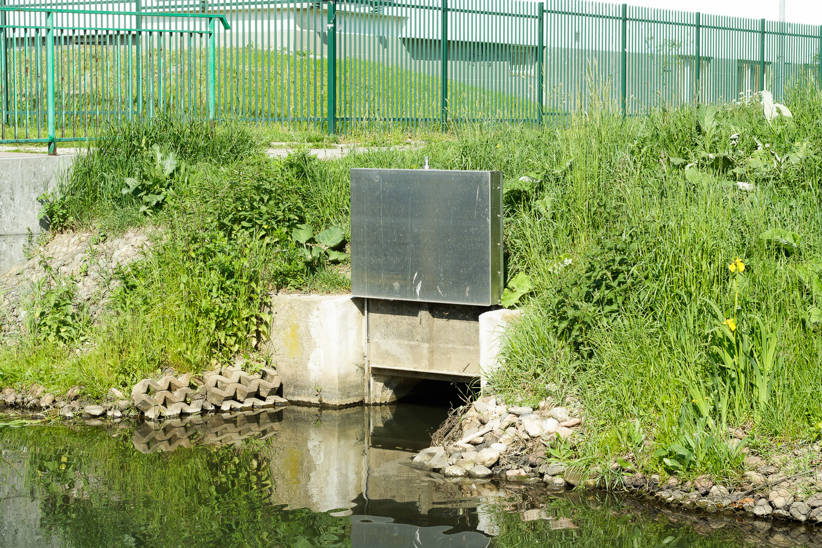 Przepustozastawka (przepusto-zastawka) na Kanale Nowa Ulga zasilająca Kanał Gocławski. Żółte kwiaty z prawej strony to kosaciec żółty. Gocław, Warszawa.